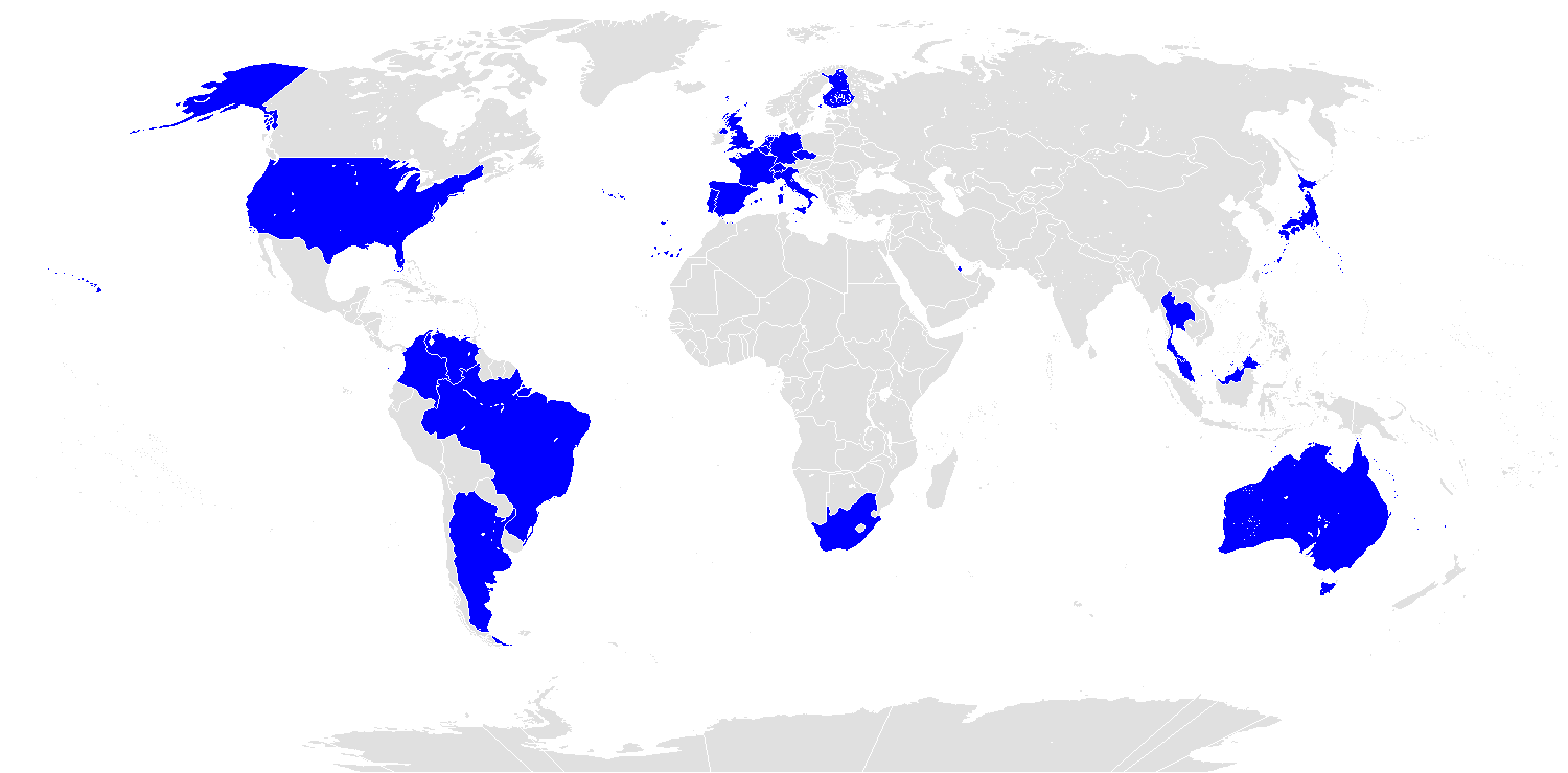 Mapa przedstawiająca państwa z których byli kierowcy MotoGP w sezonie 2014